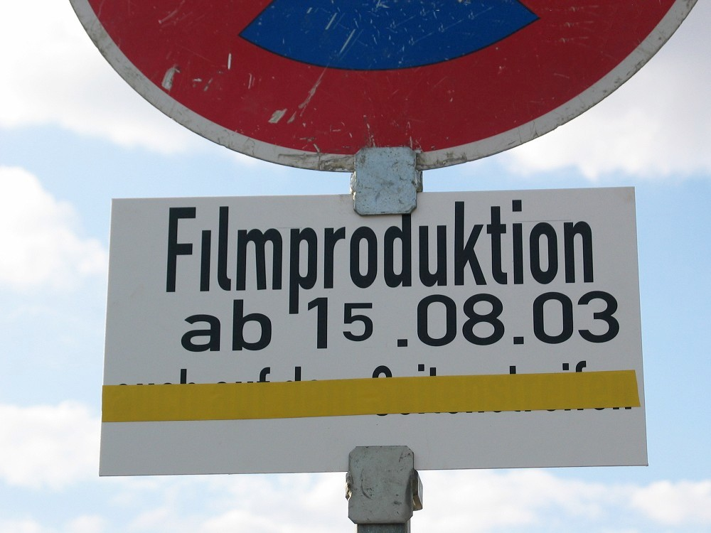 Dreharbeiten für einen Film in einer Straße in Leipzig